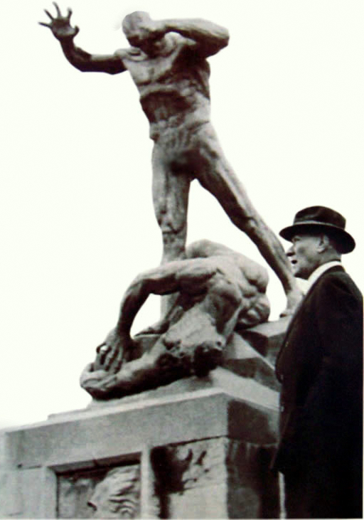 Mustafa Kemal Atatürk, Afyonkarahisar ziyareti esnasında Büyük Utku Anıtı'nı incelerken